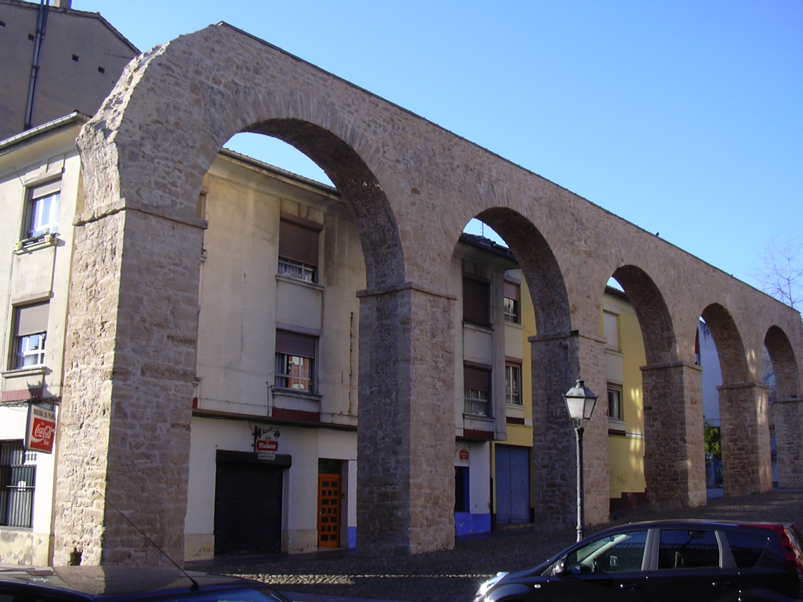 Restos de um aqueduto na cidade espanhola de Oviedo